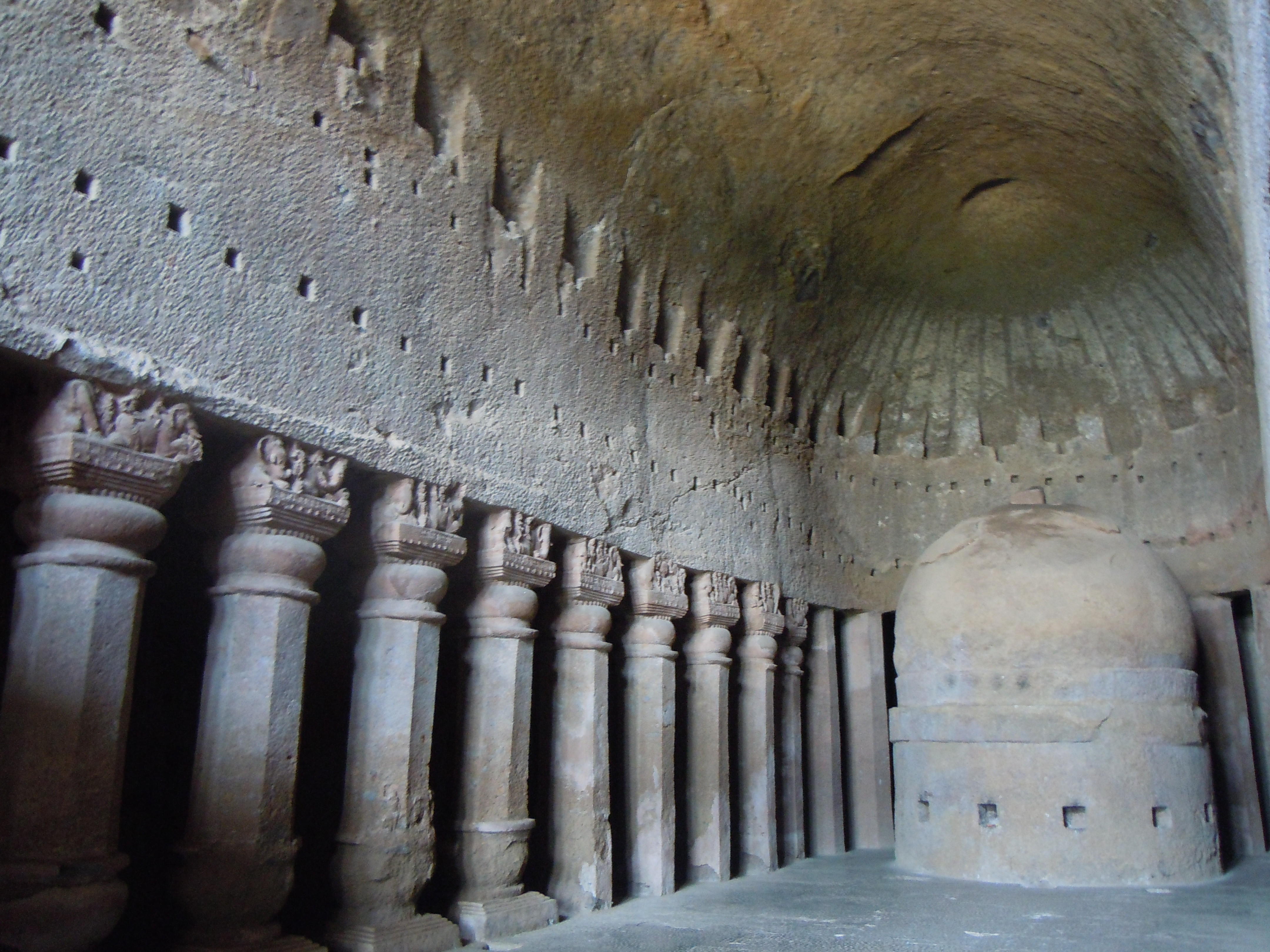 Grottes de Kanheri - Grotte n°3 - Chaitya et Stupa